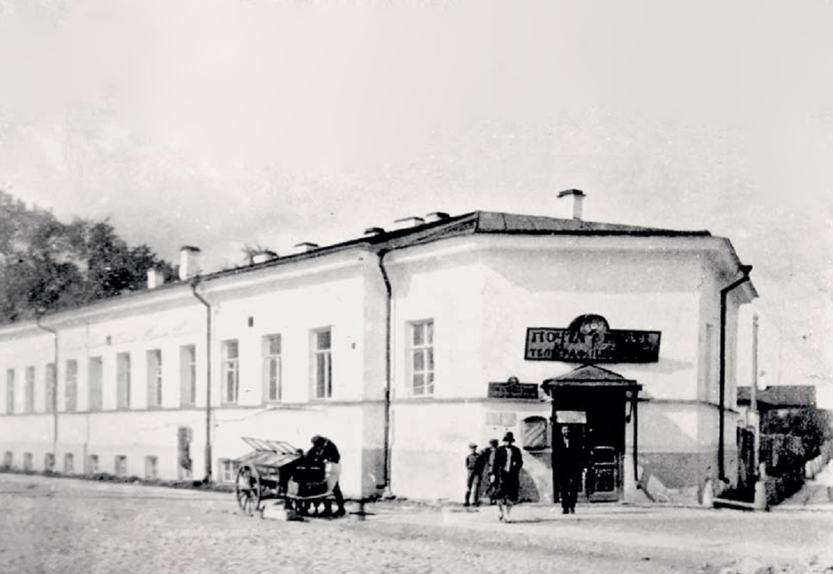 Здание Петрозаводской окружной конторы связи (снимок 1926–1927 гг., Петрозаводск)